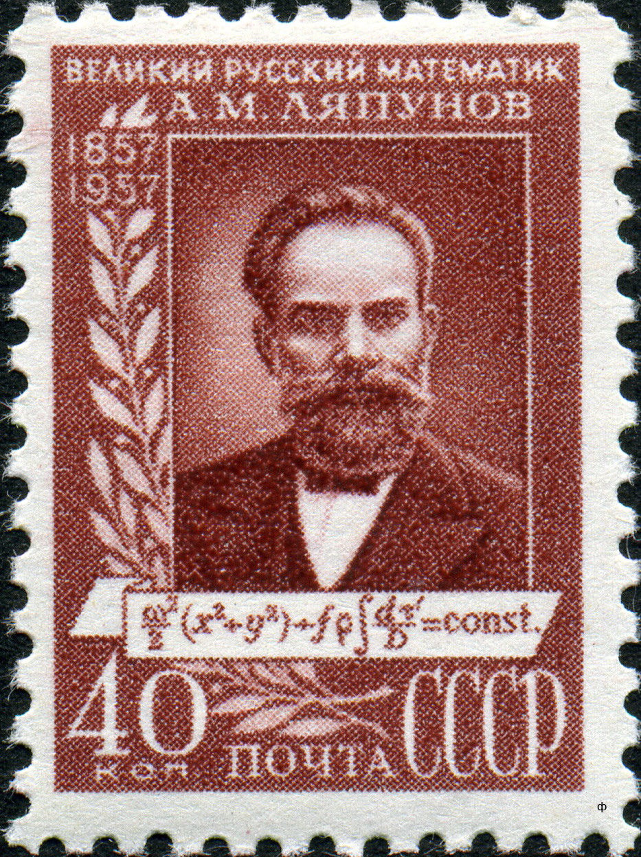 Марка СССР. Математик и механик А.М.Ляпунов и его уравнение равновесия вращающейся жидкости.